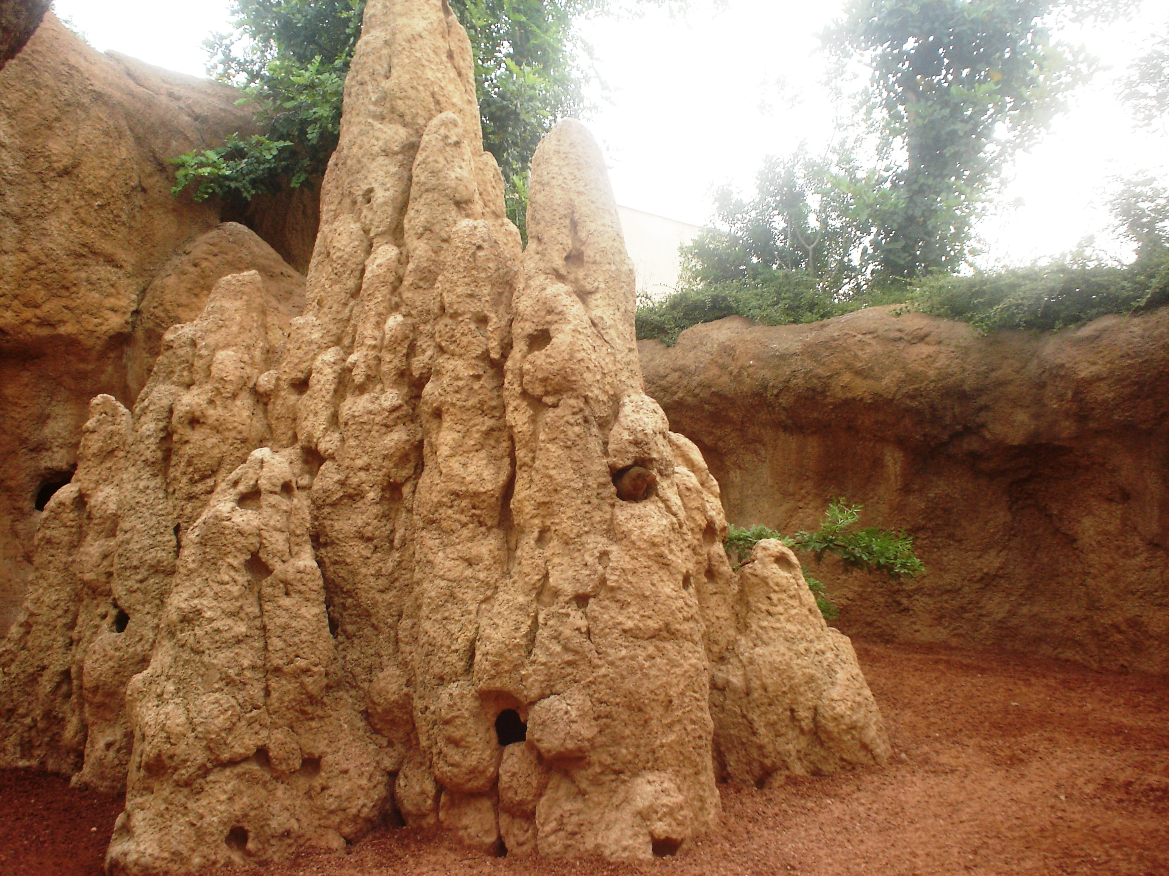 Termitaio con mangusta